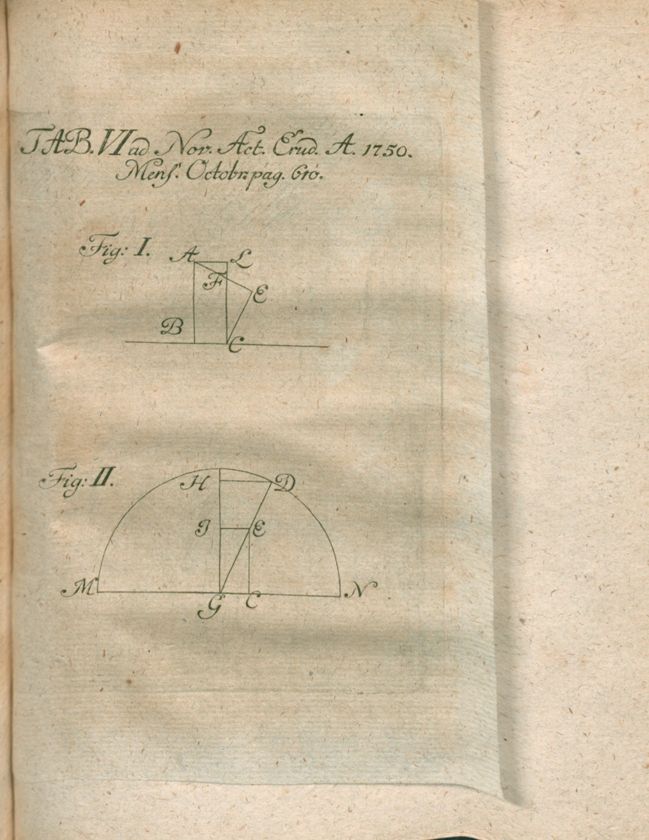 Illustration